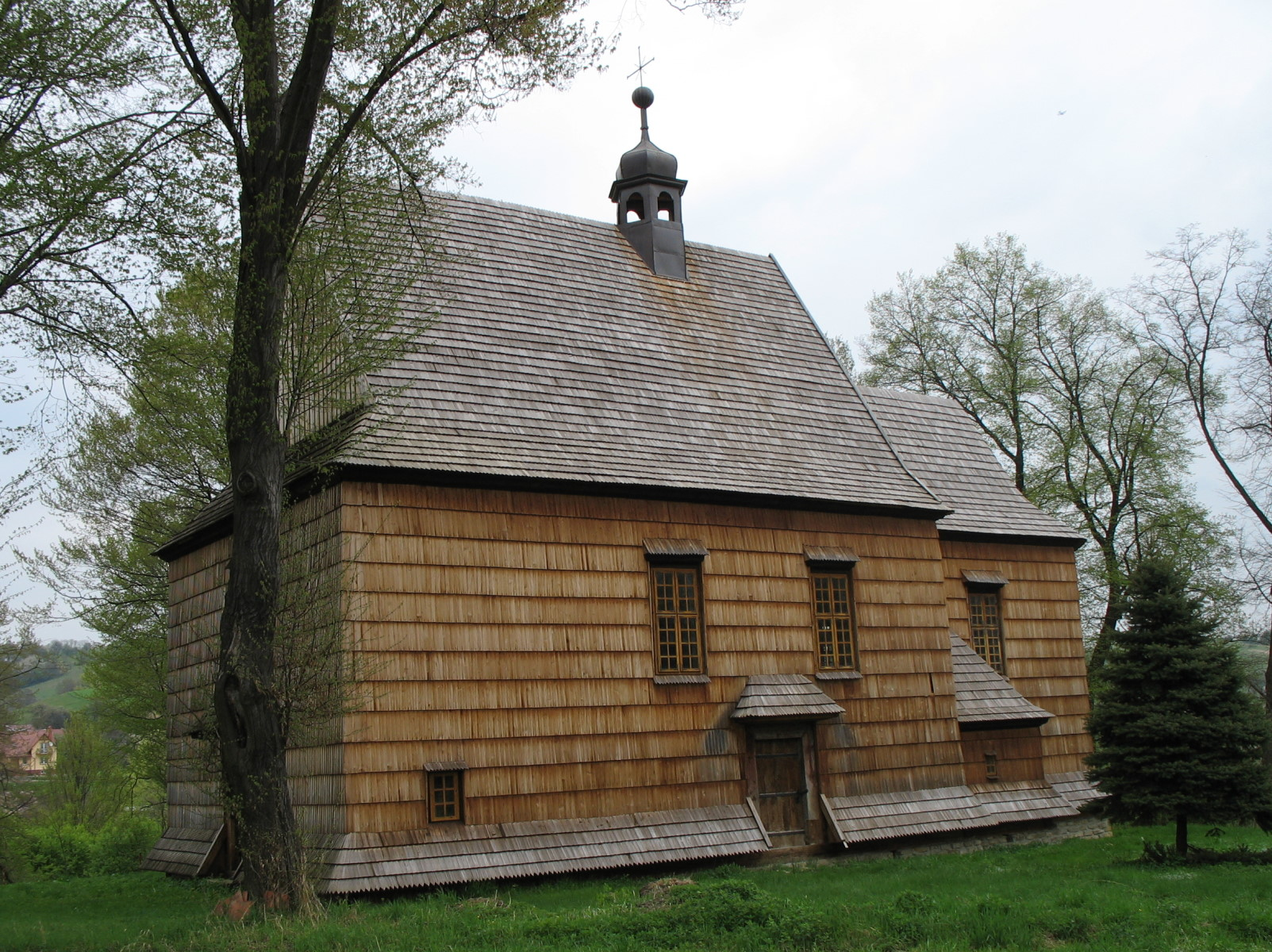 Bachórzec (Poland), church